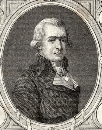 Jean-Baptiste Amar (1755-1816), membre du Comité de surête générale